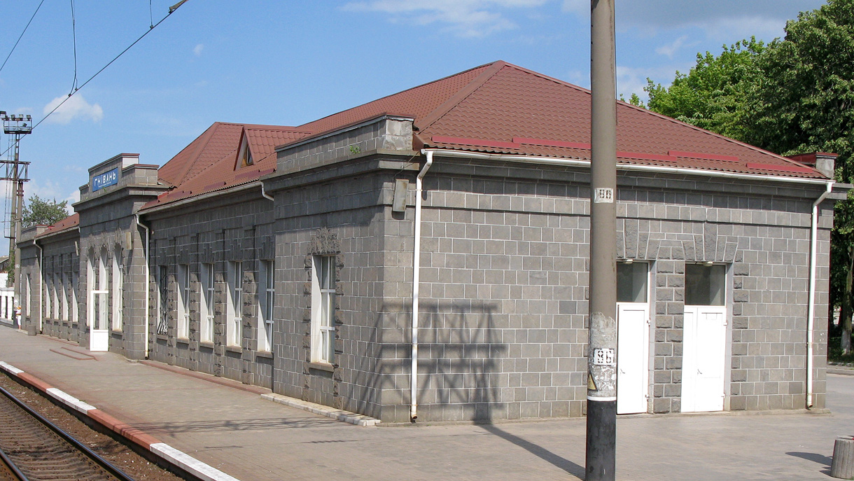 Гнівань